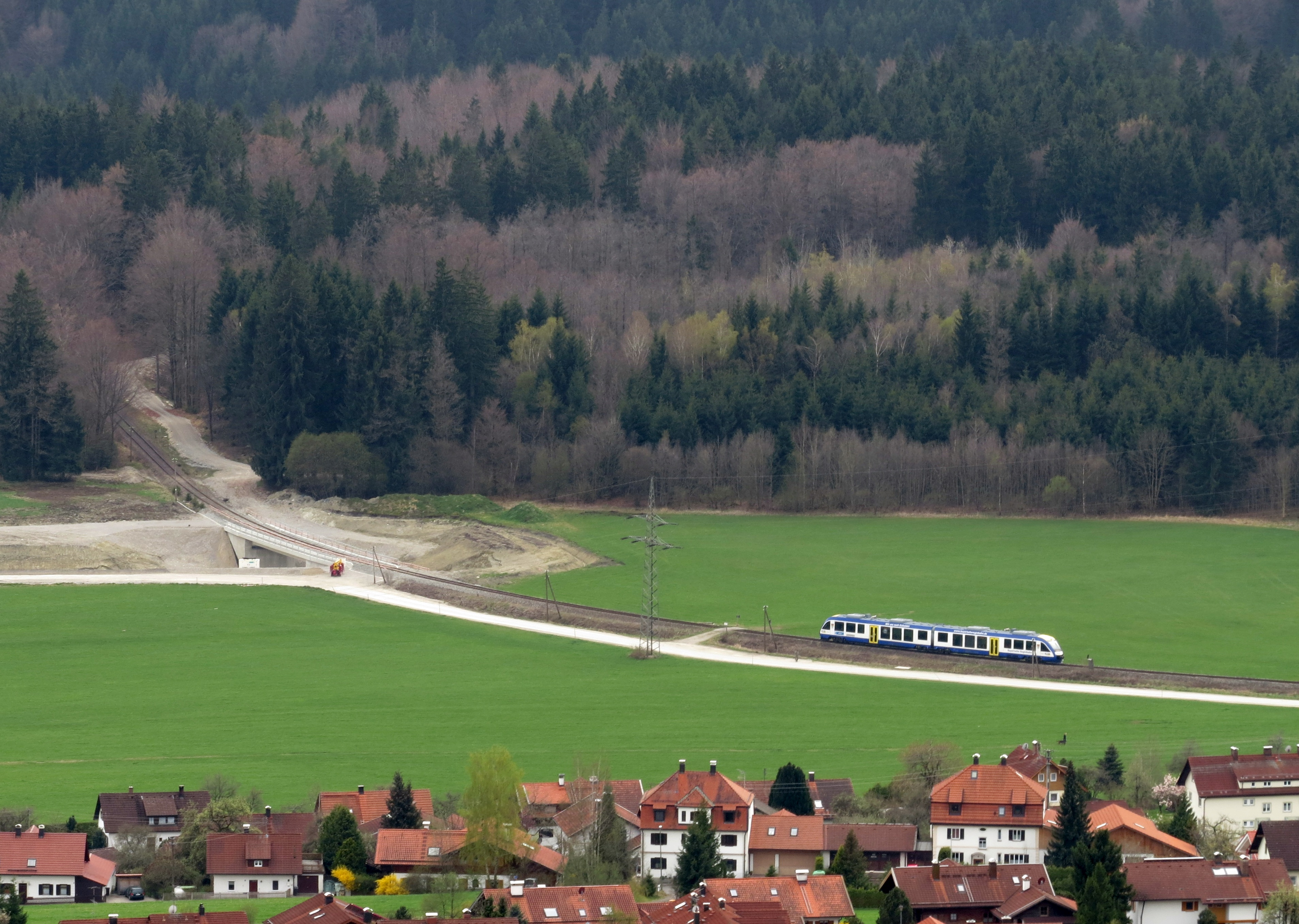 Bahnstrecke Weilheim–Schongau unmittelbar westlich des Bahnhofs Hohenpeißenberg, vom Gipfelplateau des Hohen Peißenbergs aus gesehen. Links die bereits fertiggestellte Überführung über die teilweise (zwischen Peißenberg und dieser Brücke) im Bau befindliche südliche Ortsumfahrung Hohenpeißenbergs im Zuge einer Verlegung der Bundesstraße 472 (Bauzustand April 2014). Auf der Strecke ein Triebwagen LINT 41 der Bayerischen Regiobahn vor der Einfahrt in den Bahnhof.